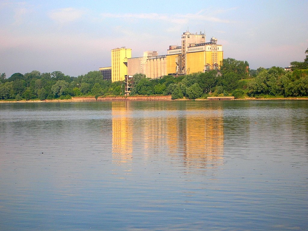 Wisła w Brdyujściu w Bydgoszczy. Zakłady Globalmalt Polska.